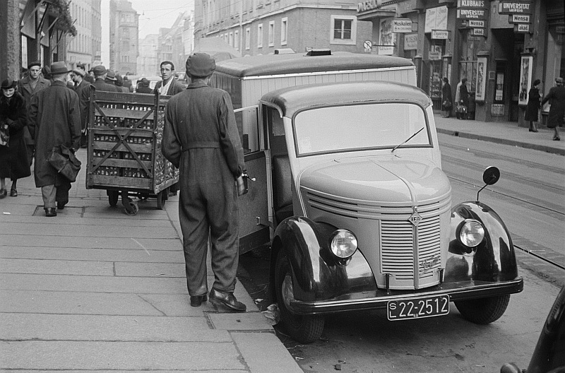 Original image description from the Deutsche FotothekAnsicht eines parkenden IFA Framo Lebensmitteltransporters am Neumarkt